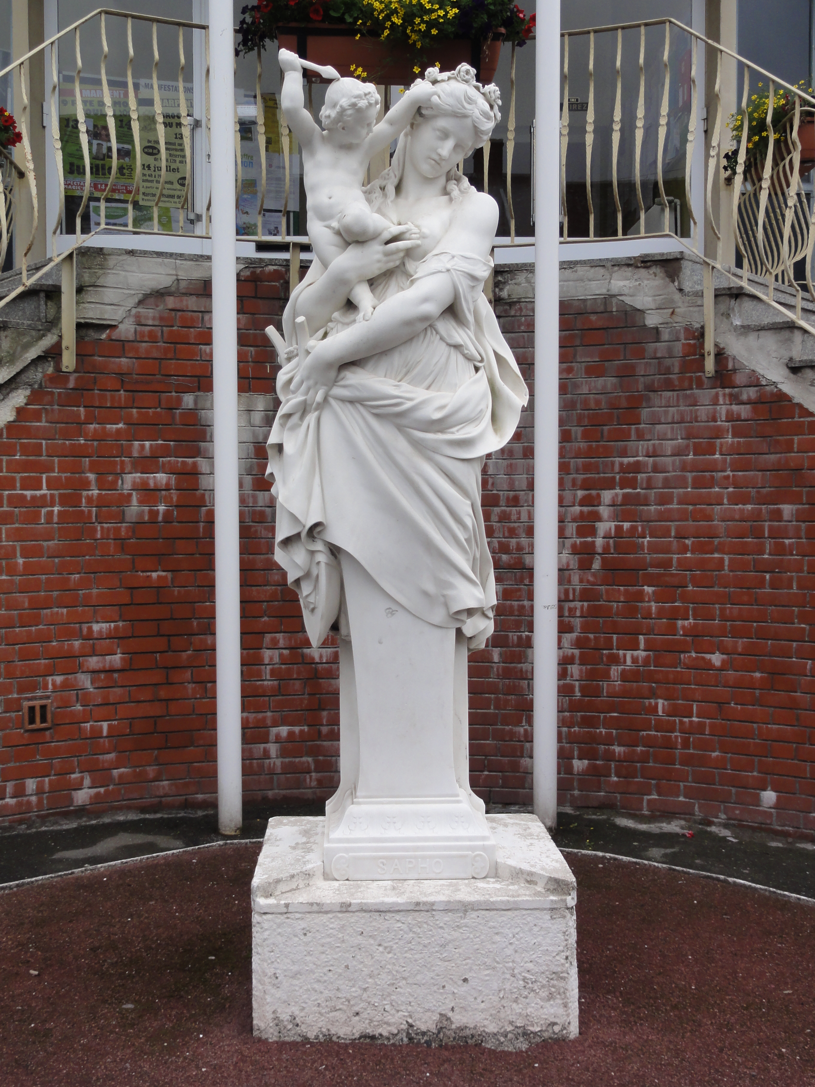 Marpent (Nord, Fr) statue Sapho devant la mairie, artiste Eugène Guillaume